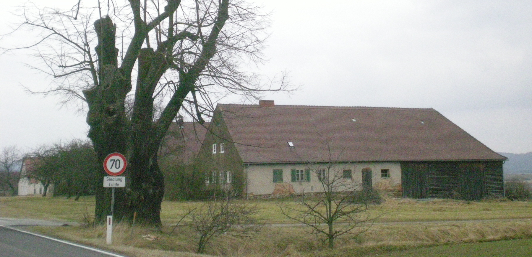 Aussiedler-Siedlung Siedlung Linde bei Oberndorf bei Raabs an der Thaya in Niederösterreich.